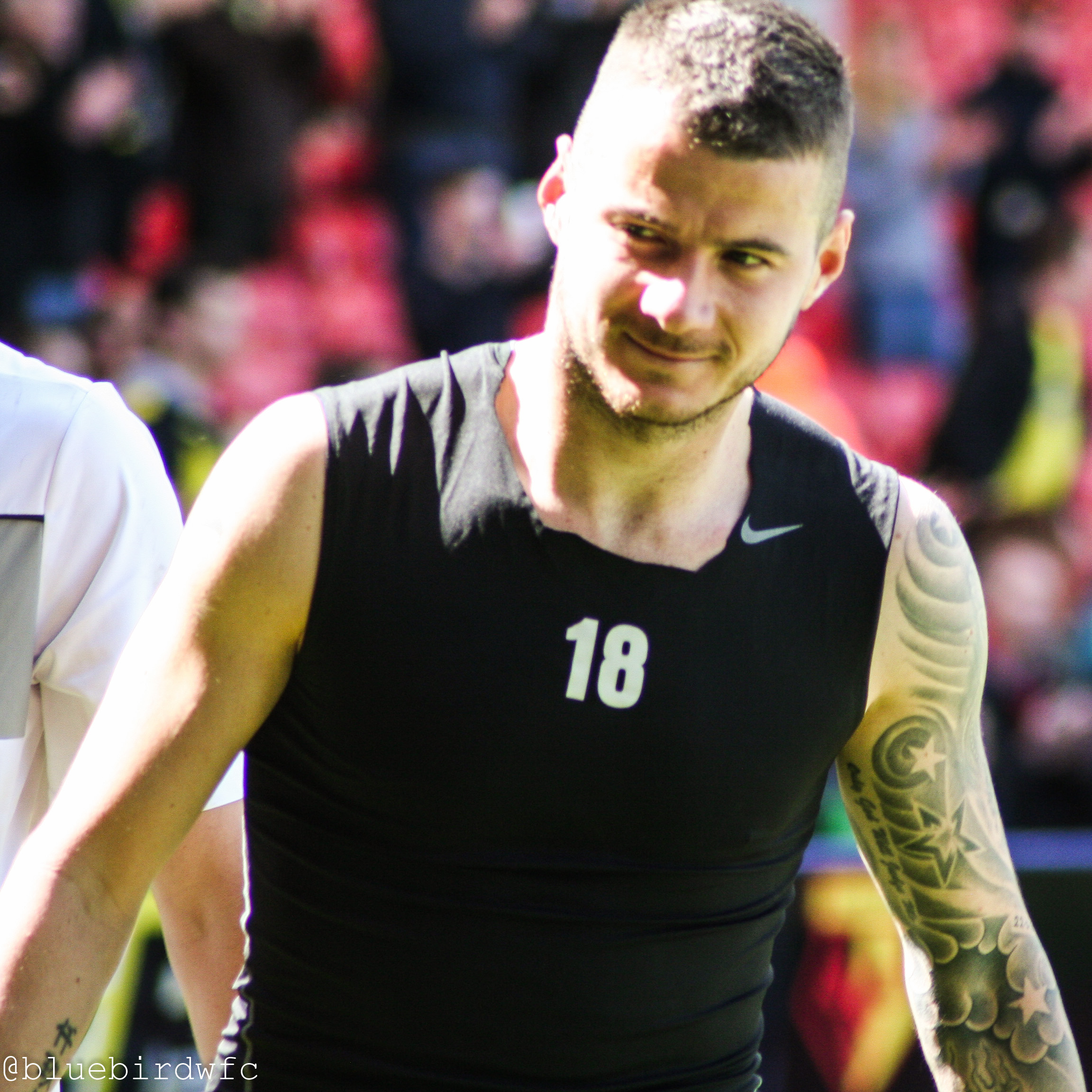 Daniel Pudil